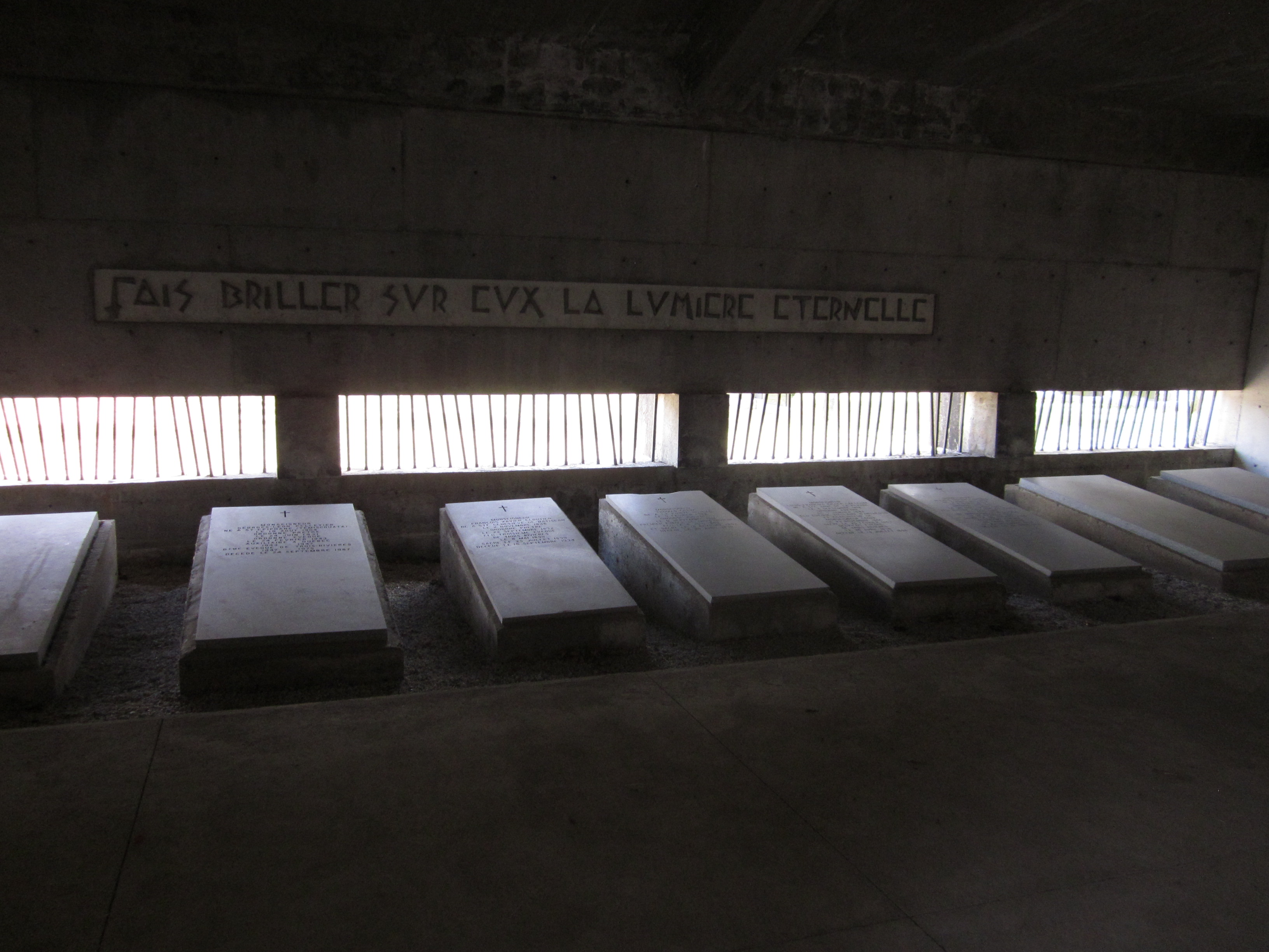 Mausolée des Évêques-de-Trois-Rivières, 3400, boulevard des Forges, Trois-Rivières (Canada). (Protection MH classé. Voir la liste des lieux patrimoniaux de la Mauricie pour plus de détails).